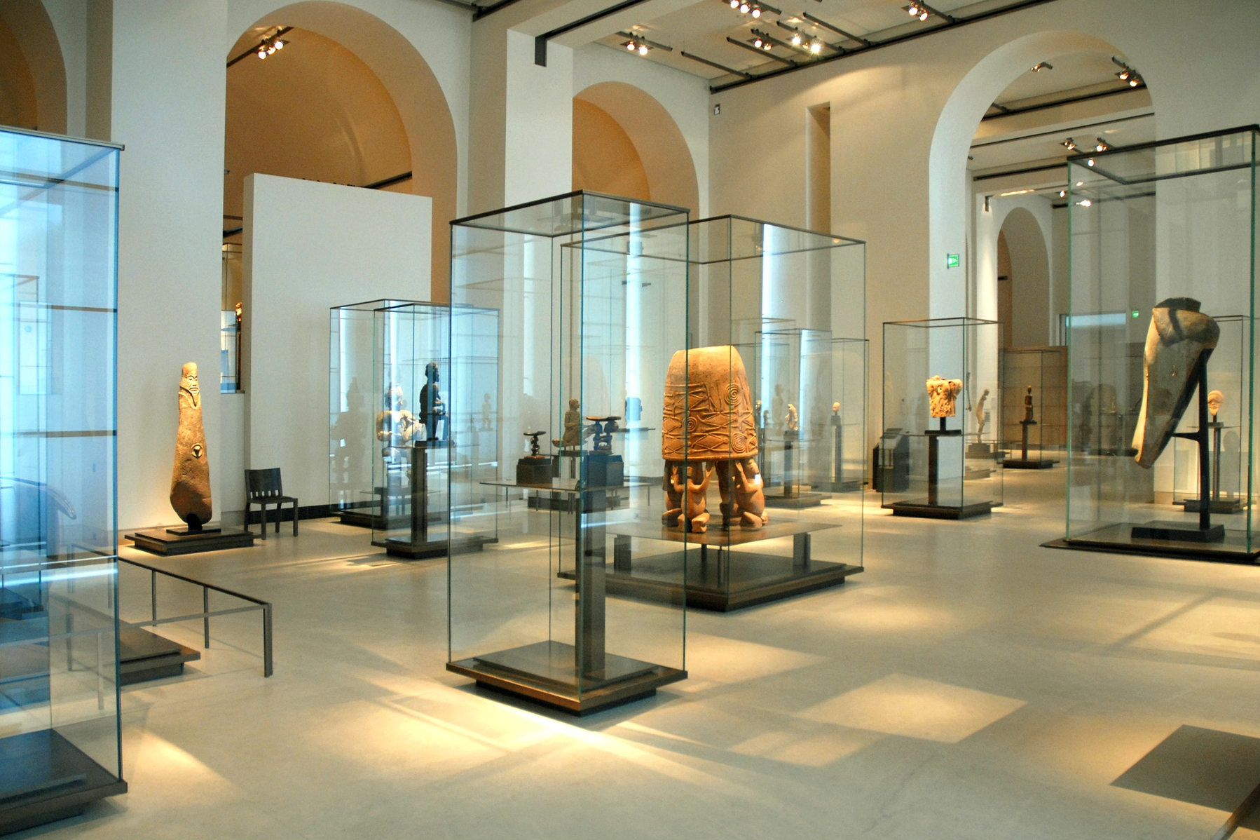 Le musée du Quai Branly au palais du Louvre / Pavillon des Sessions